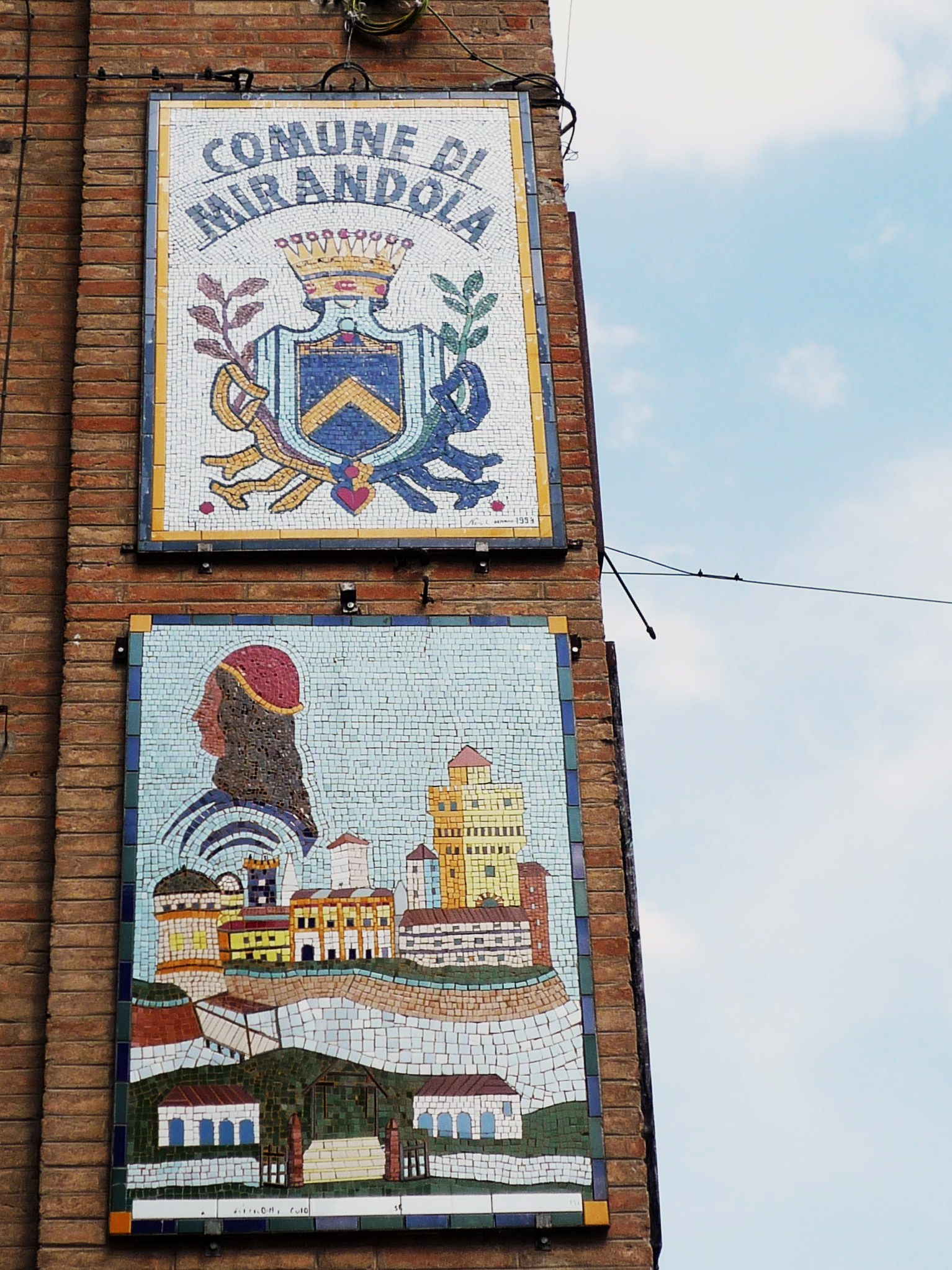 Mirandola-4